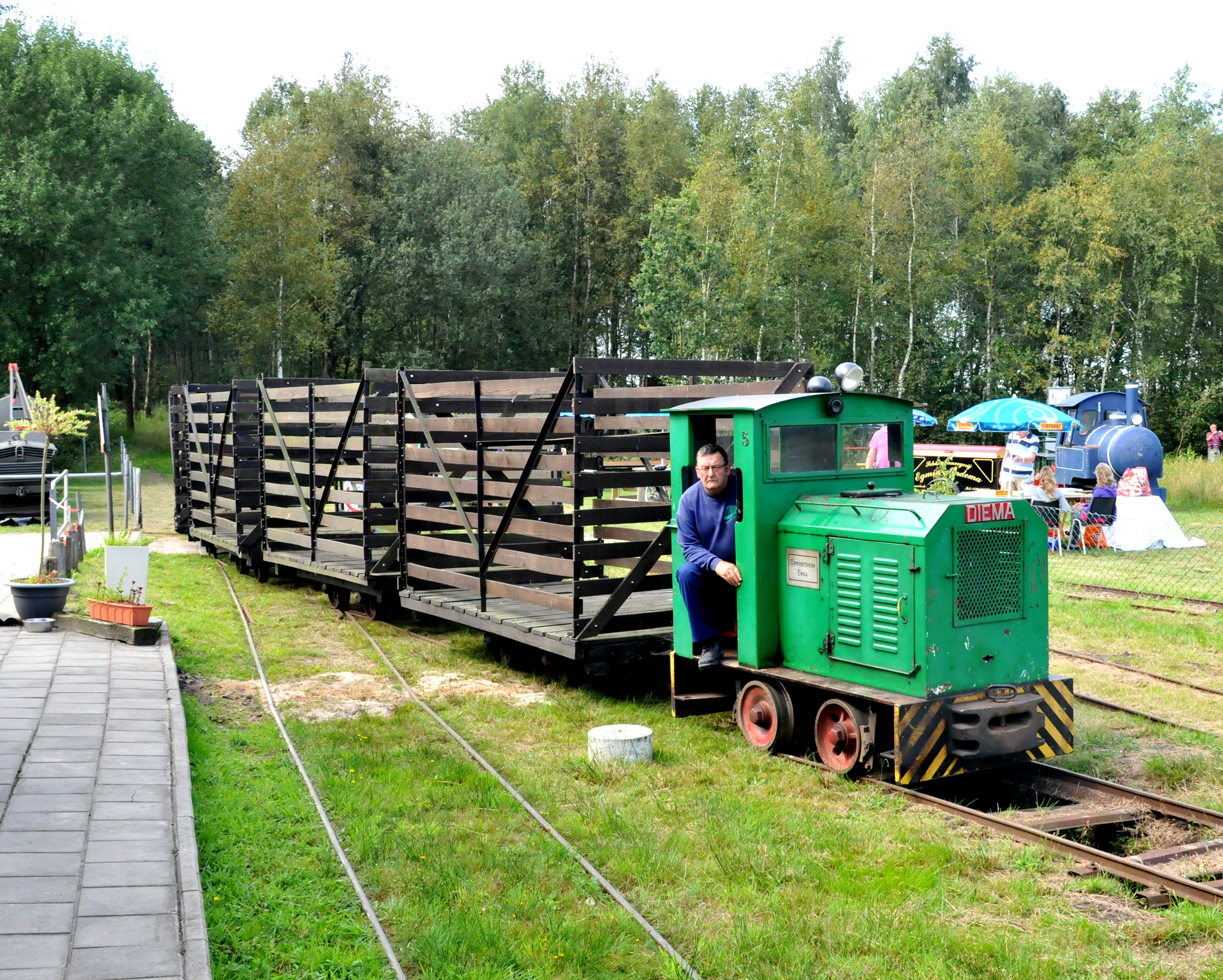 Industrieel Smalspoor Museum (ISM) locomotief 5 van het Diema type DS 12 (ex Griendsveen Mij, Erica) met de bijbehoorende bolsterturf wagens te Erica. (bestuurder; Jan Hedder.)